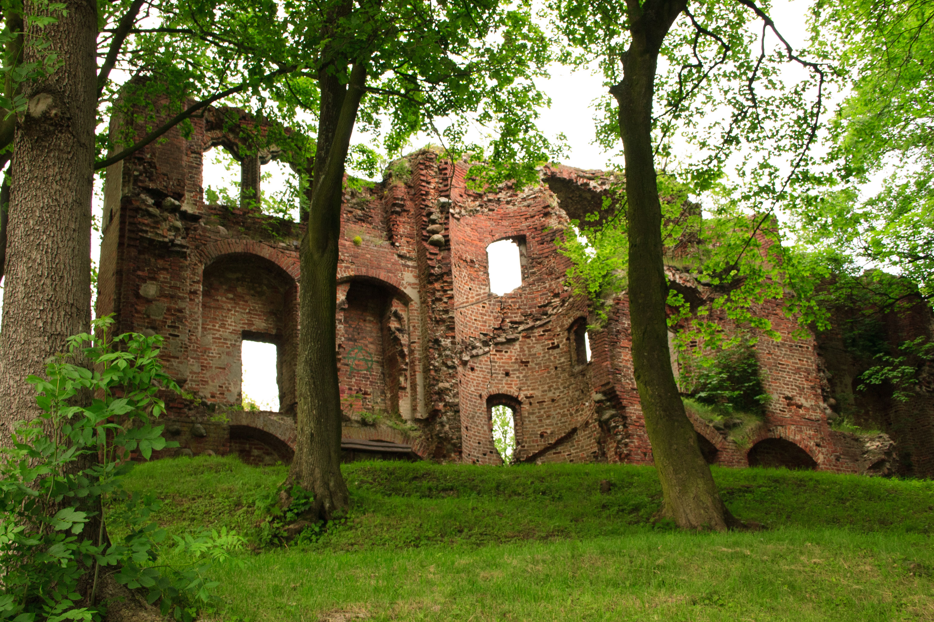 zamek (ruina), Dobra (powiat łobeski)